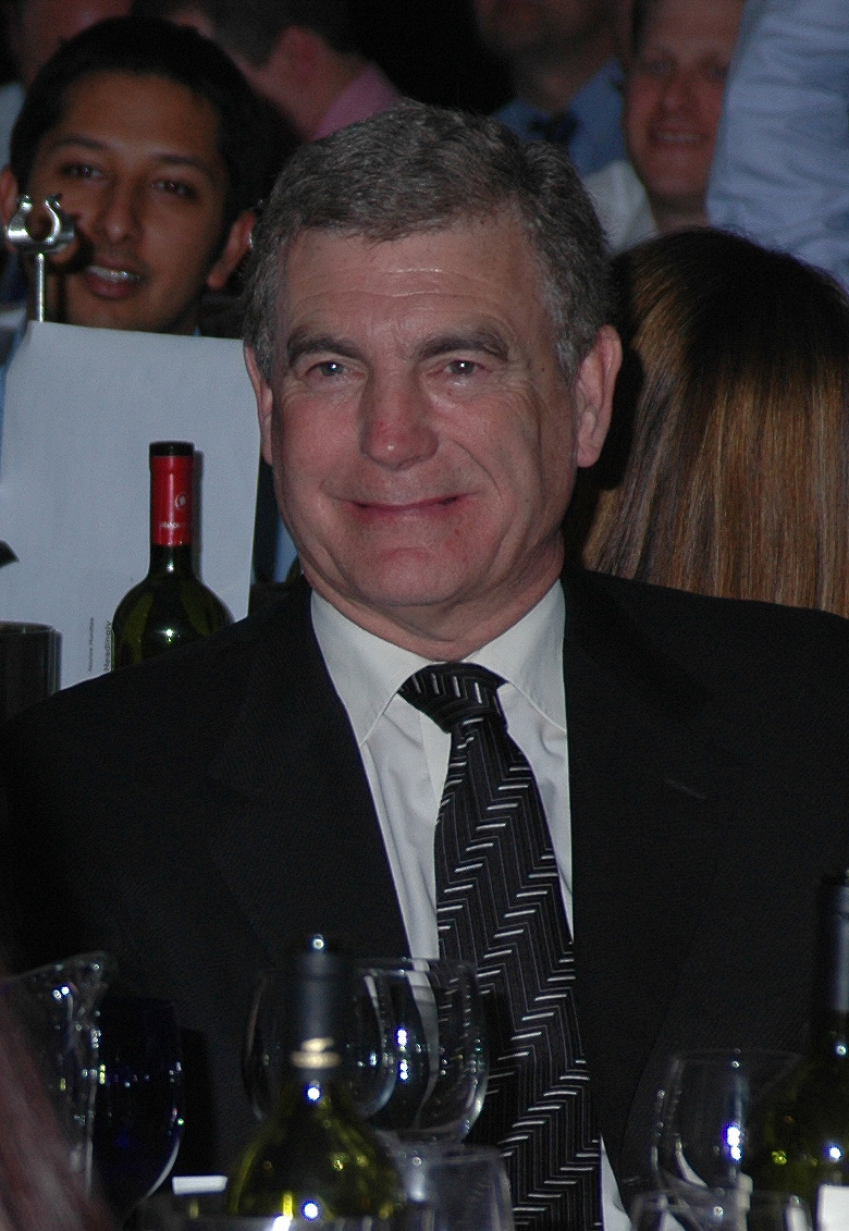 Trevor Brooking